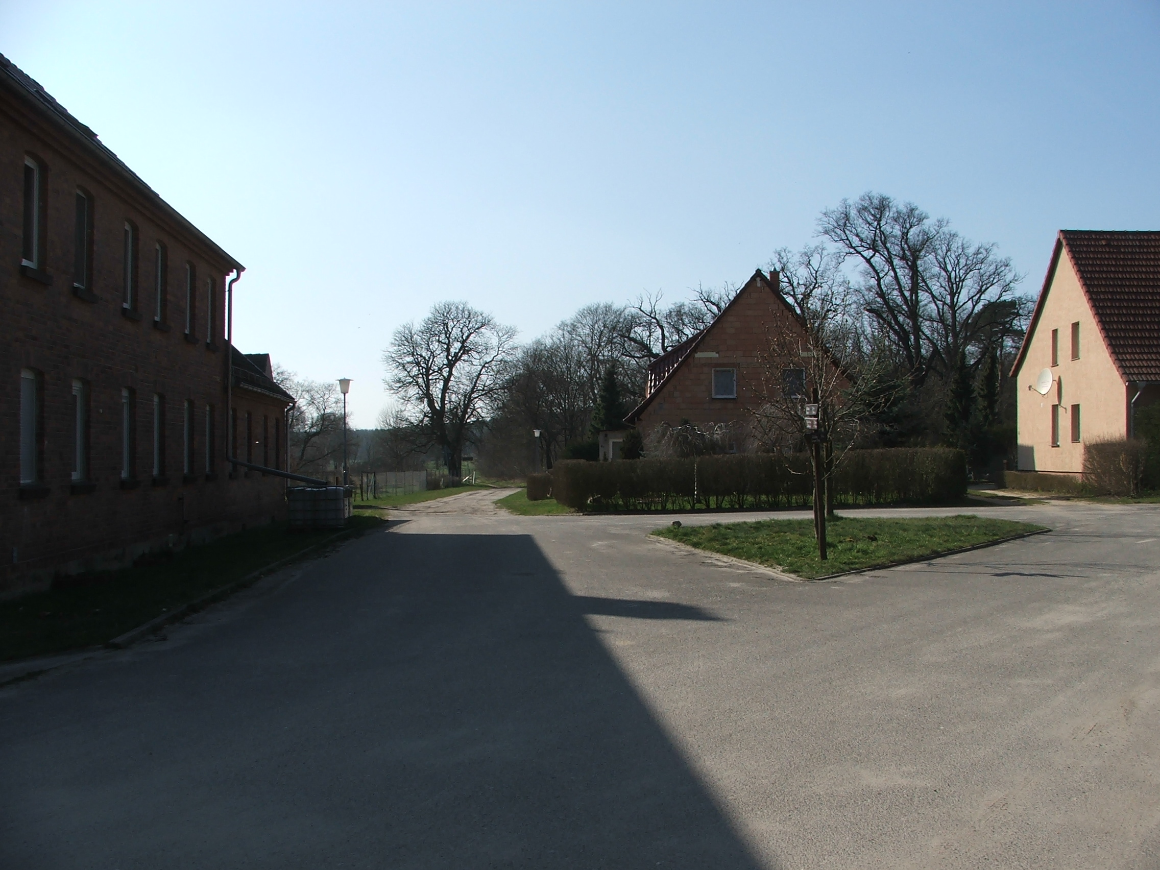 Ortsteil Weißenburg (Schlieben)